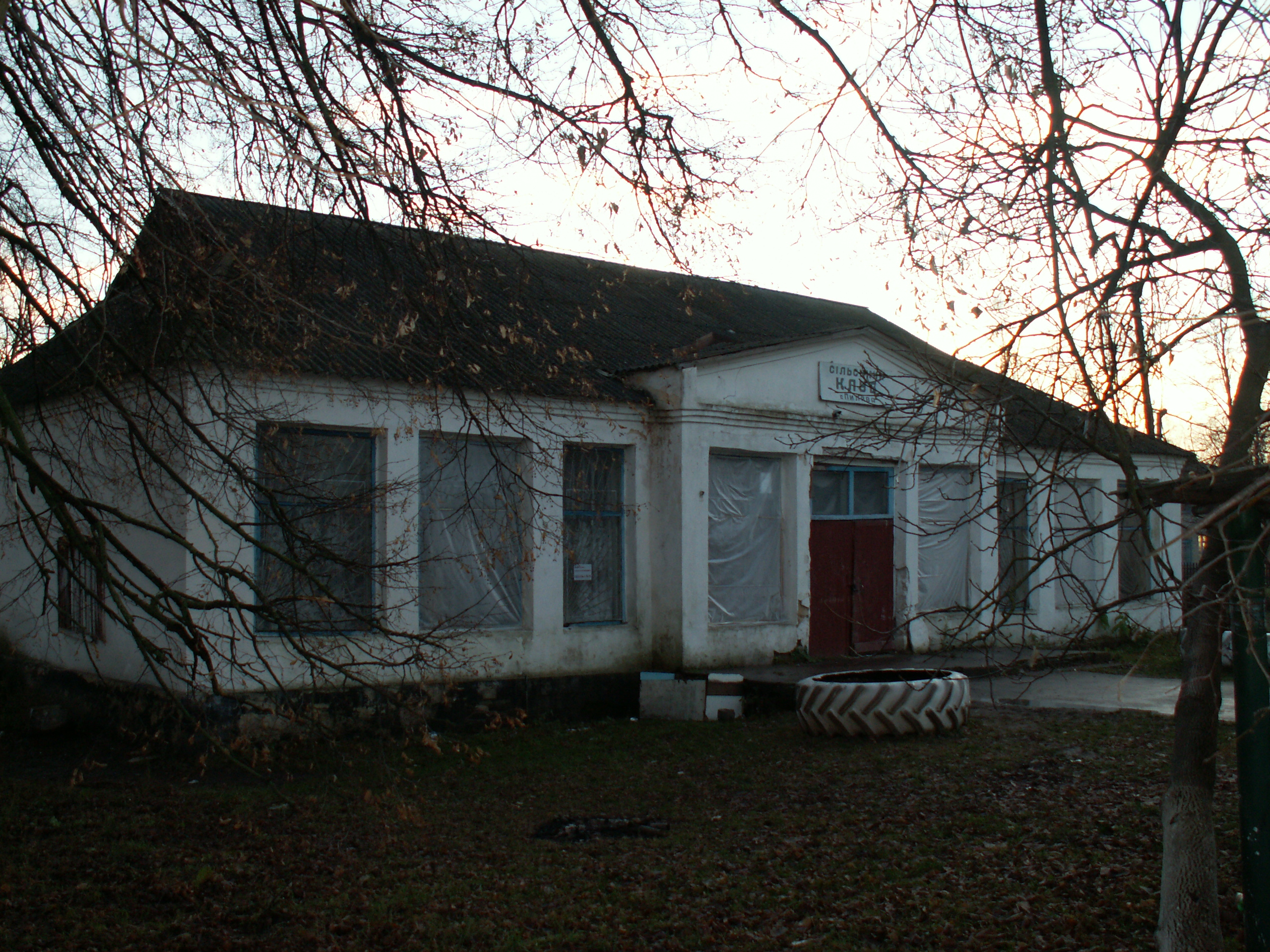 Сільський клуб у Пиляві Тиврівського району